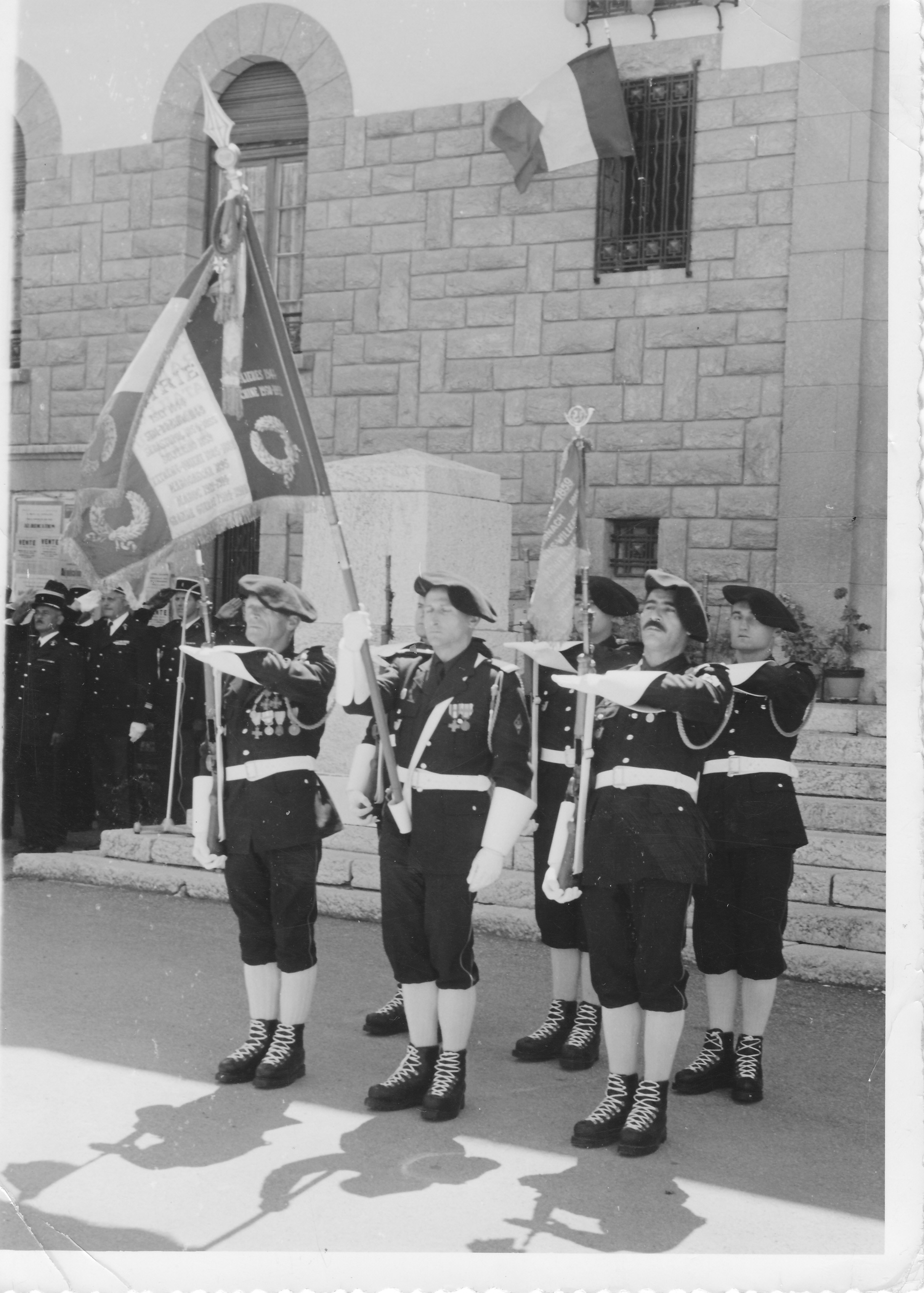 Drapeau des Chasseurs à la garde du 11° BCA. Entouré du fanion du 11° BCA et du fanion du 15° BCA. Le fanion du 15° BCA était confié à la garde du 11° BCA à sa dissolution. Mai 1970